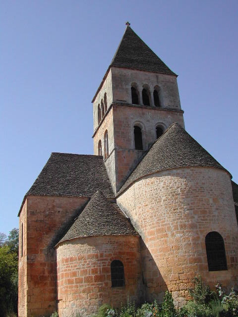 Photo de l'église de Saint Léon sur Vézère (24).